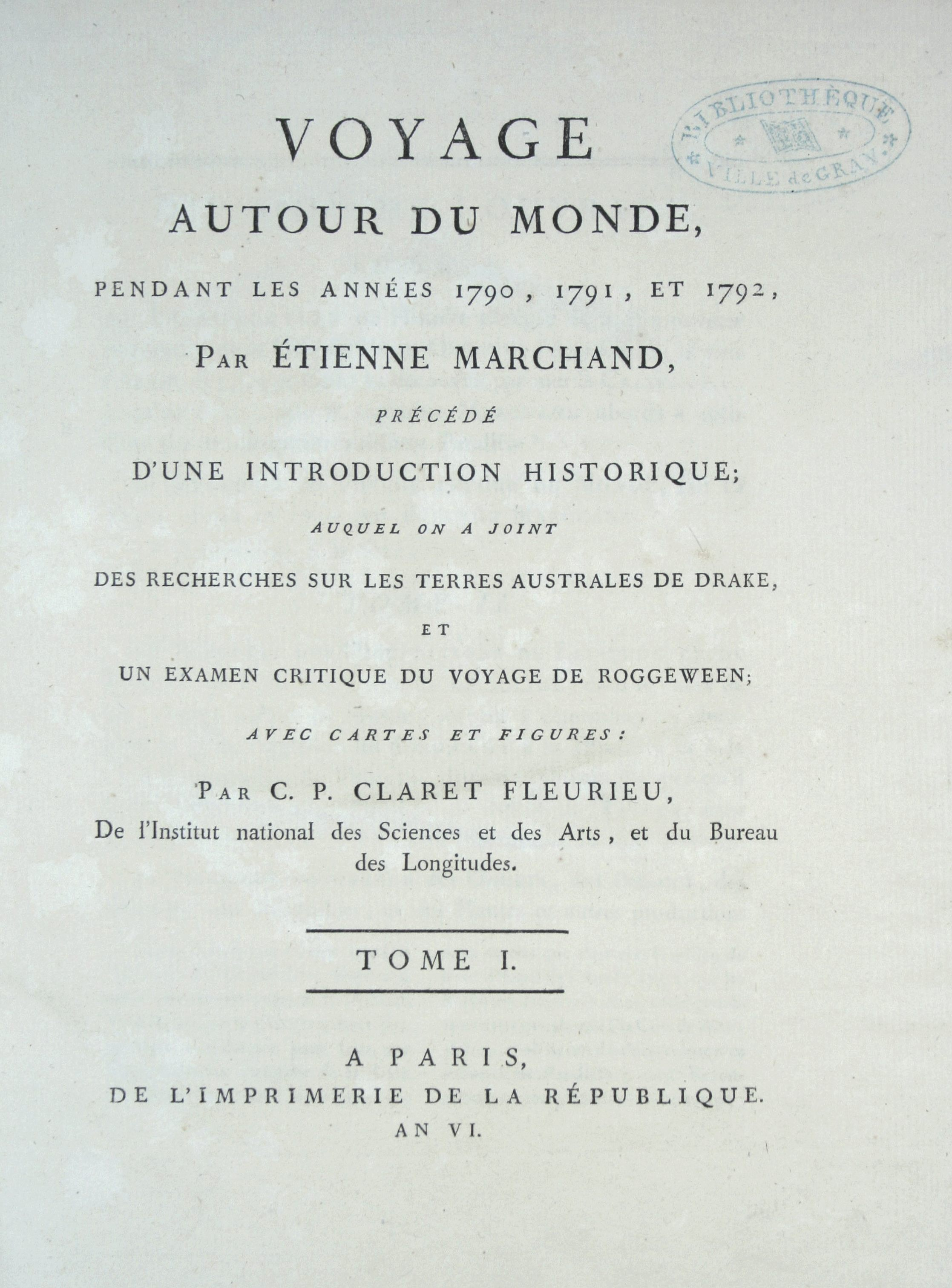 Page titre du Voyage d'Étienne Marchand (examplaire de la bibliothèque patrimoniale de Gray